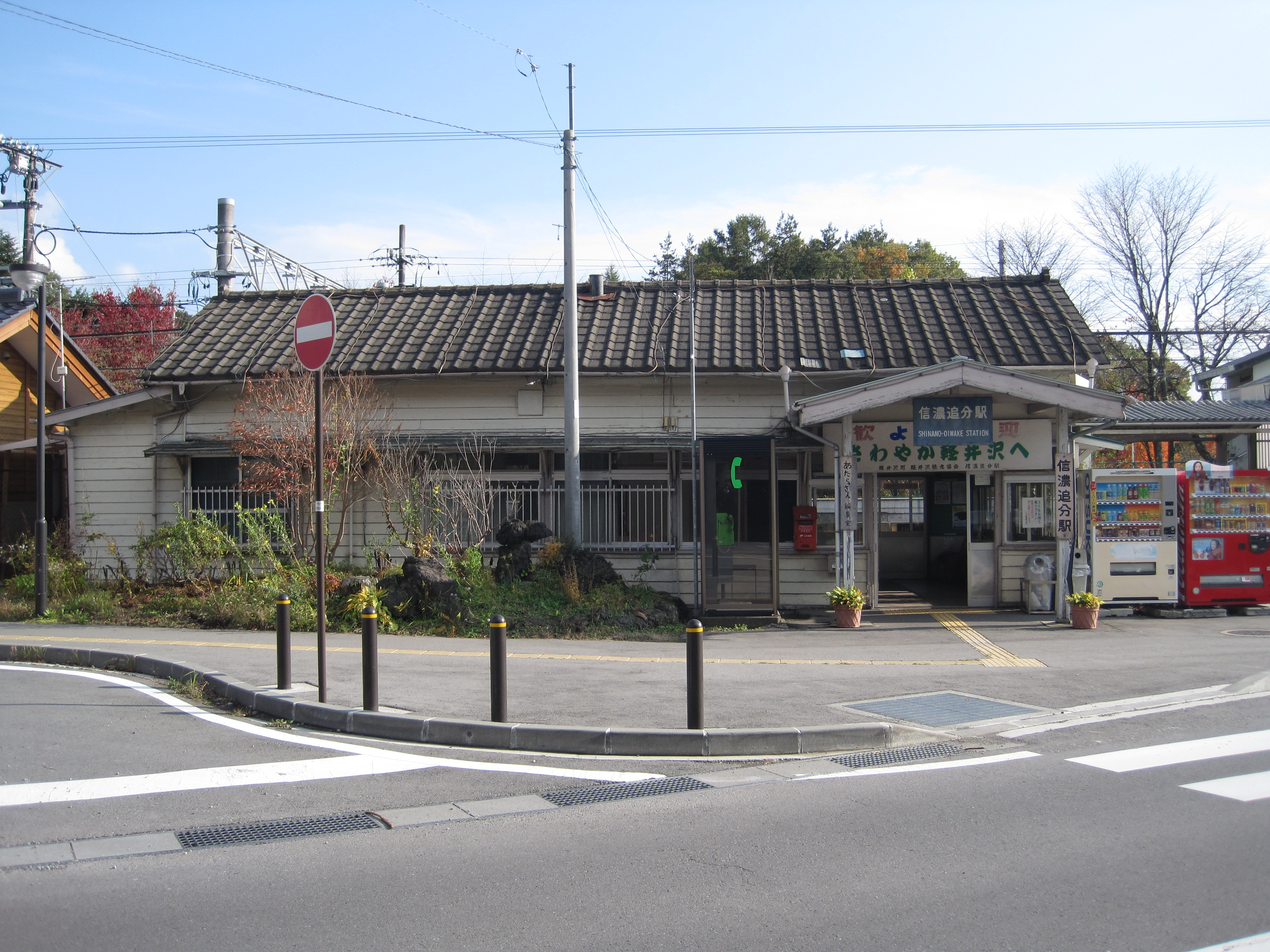 信濃追分駅駅舎